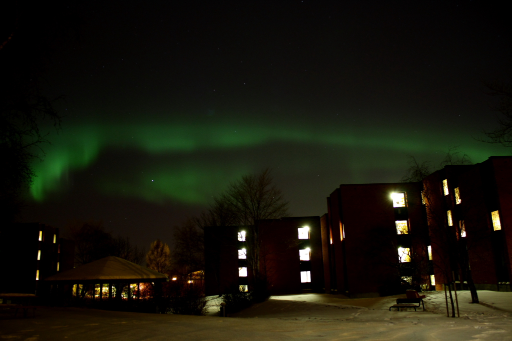 Aurora